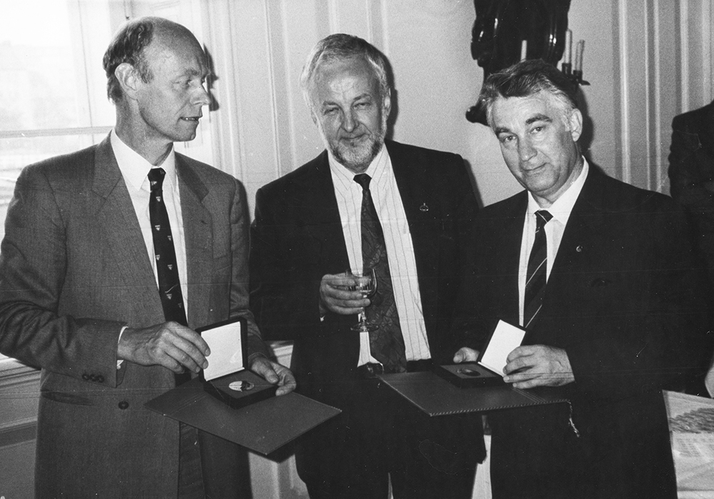 Peter Oehme überreicht auf dem III. Berliner Wirkstofffsymposium des IWF in Berlin die Karl-Lohmann-Gedenkmedaille an Detlev Ganten und Oleg Gomazkov.